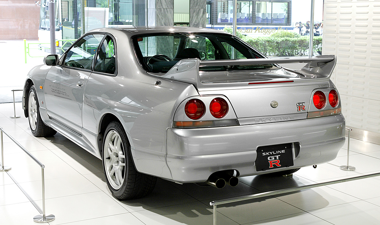 Nissan Skyline R33 GT-R, in Nissan Ginza Gallery.